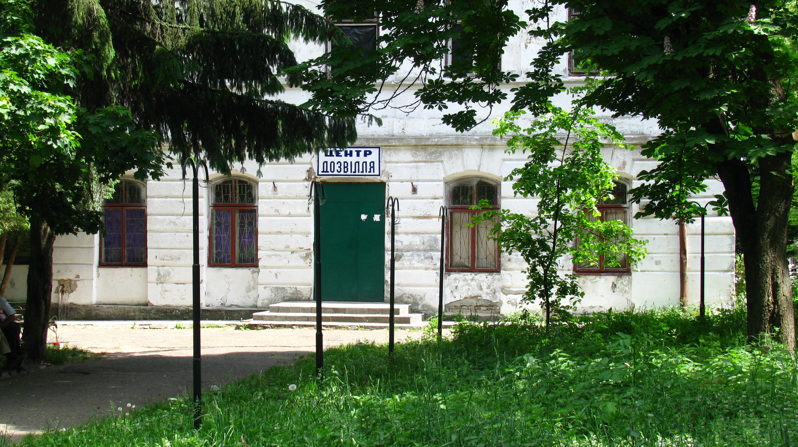 "Новая" синагога в Сокале.